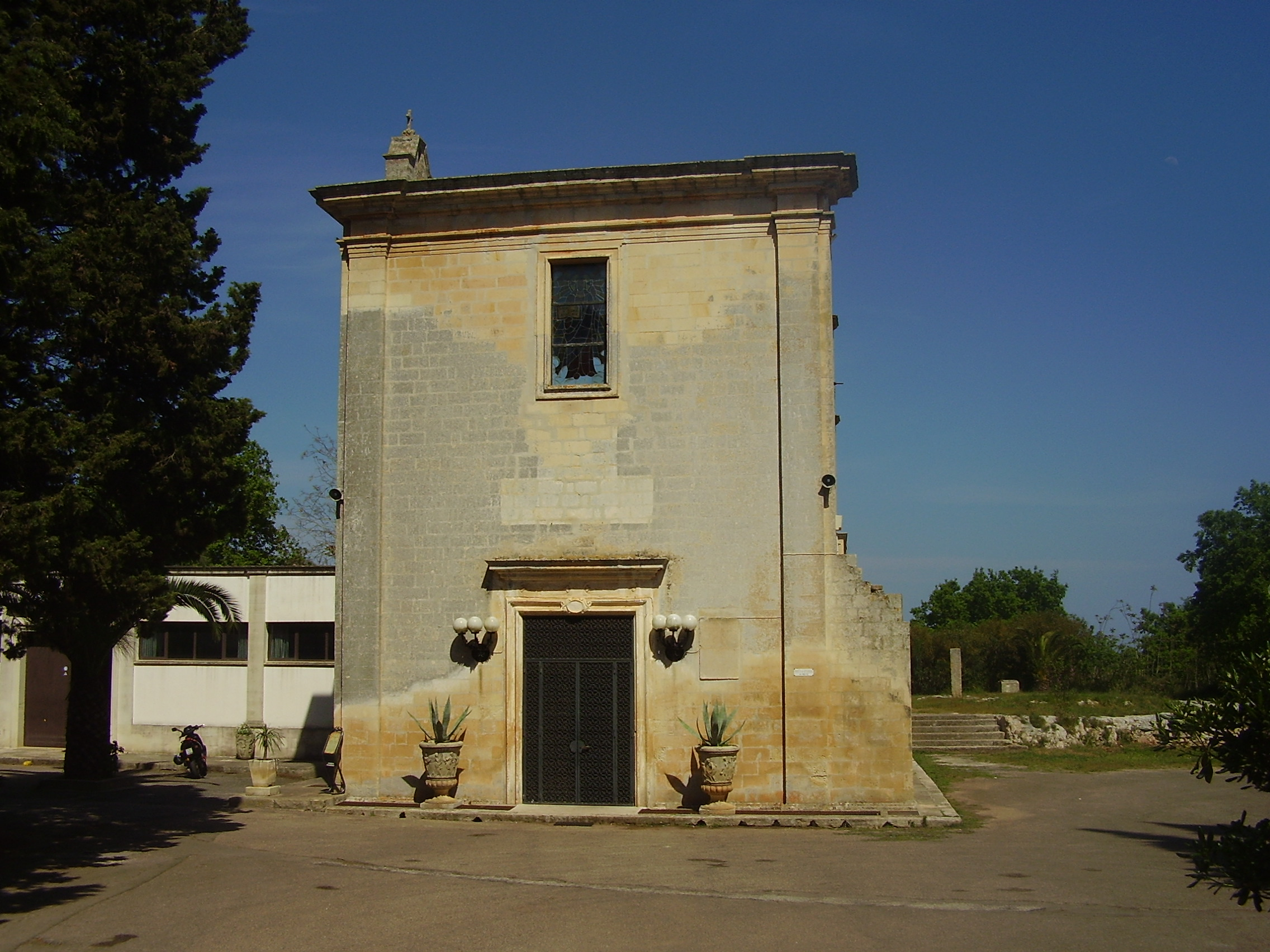 Palmariggi Santuario